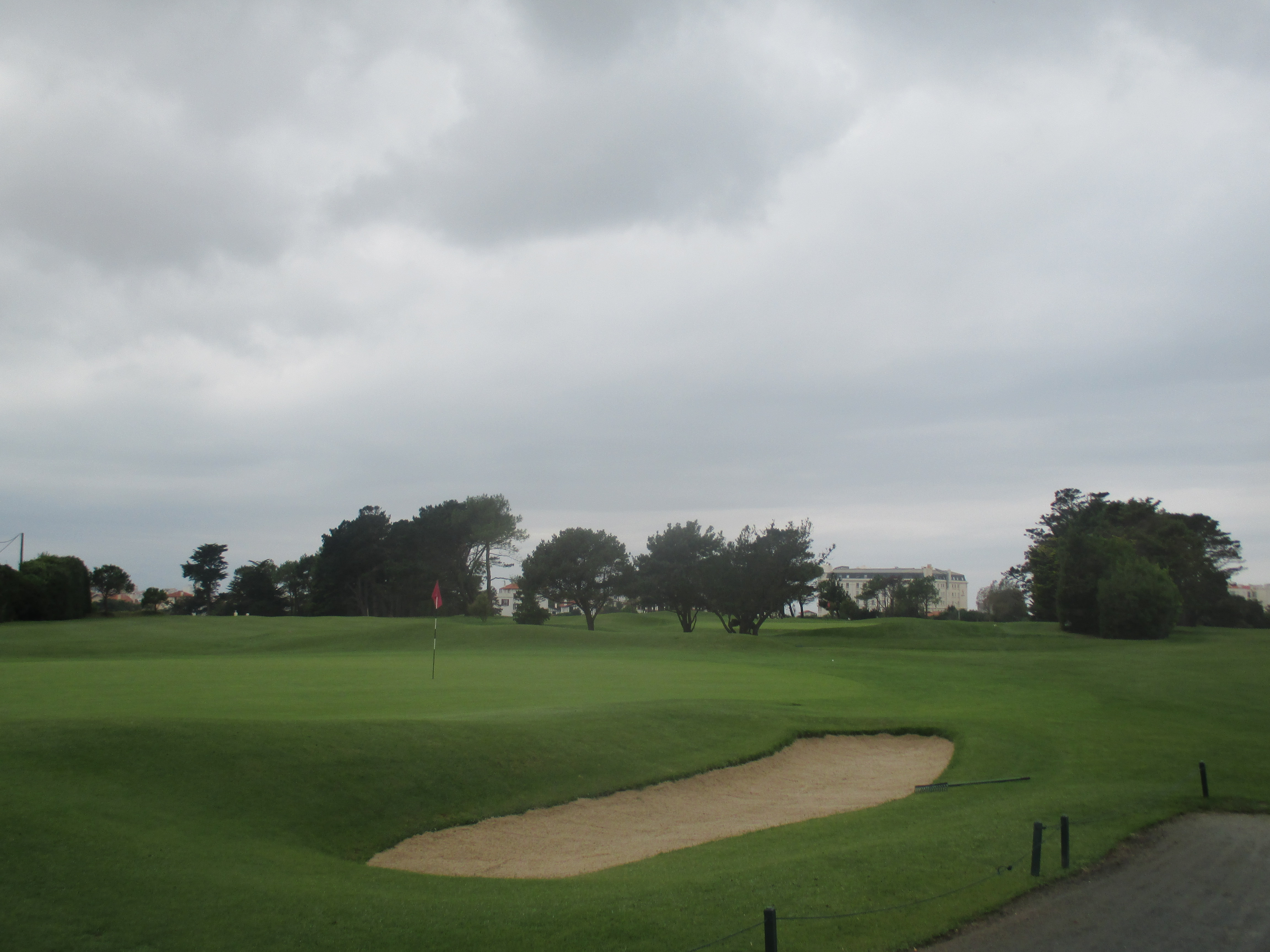 Vue du golf du Phare à Biarritz. Au fond l'hôtel Régina